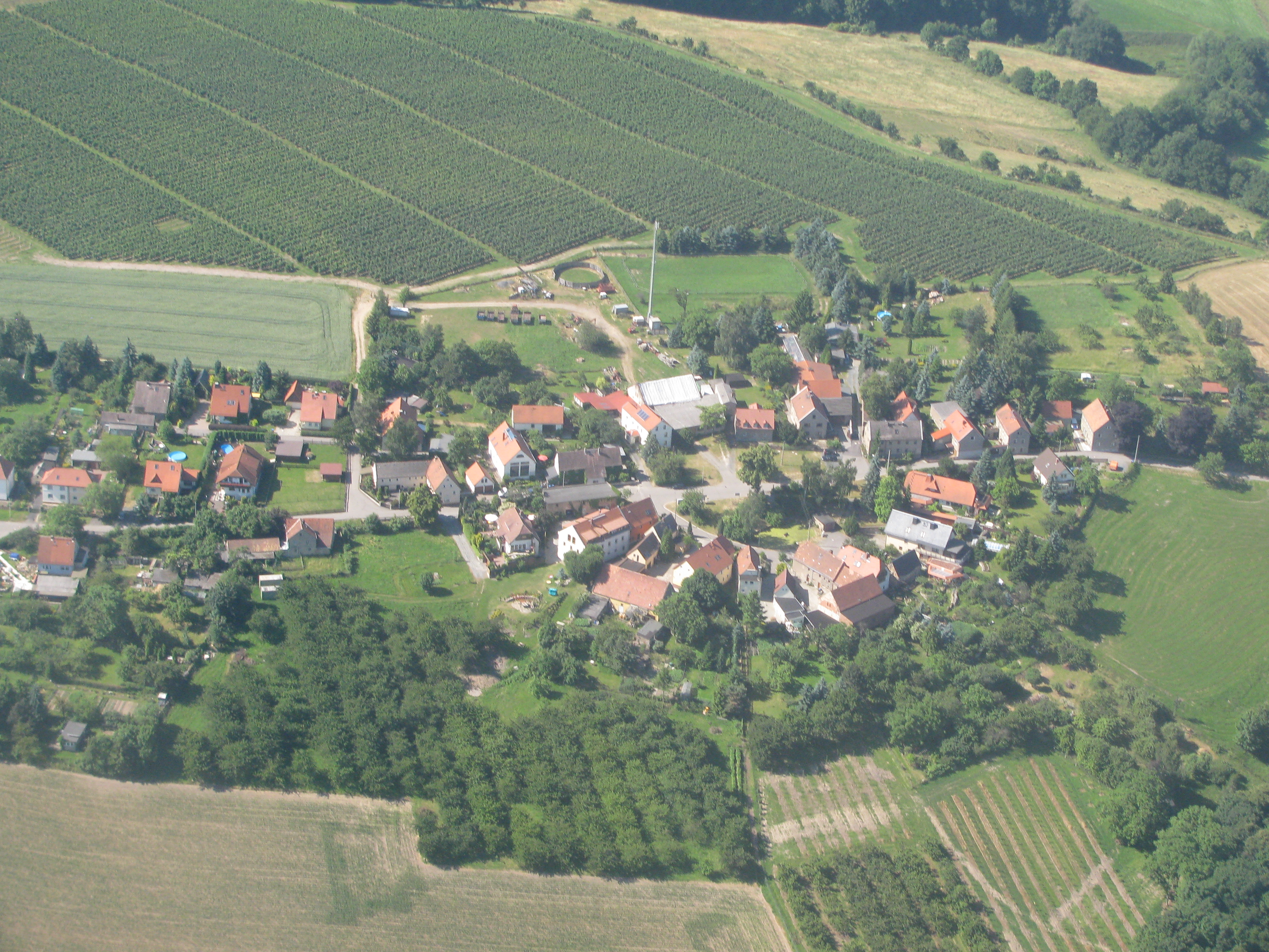 Dohna-Burgstädtel Luftbild